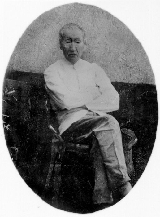 Negatif. Potret Dr. Herman Neubronner van der Tuuk